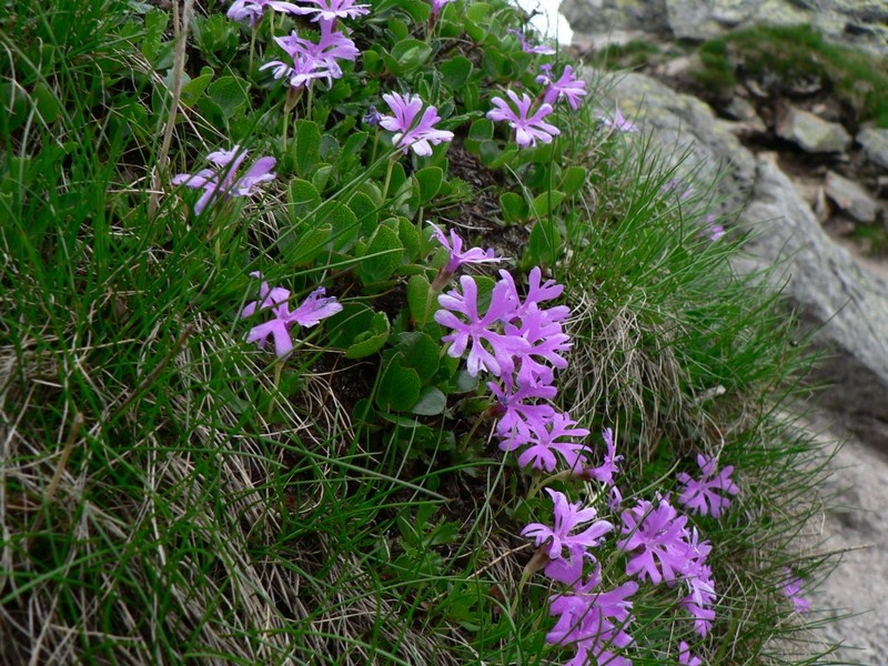 Prvosenka nejmenší v Liliovém sedle (Vysoké Tatry).